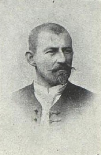 Josef Prášek (1861-1925), rakouský a český statkář a politik